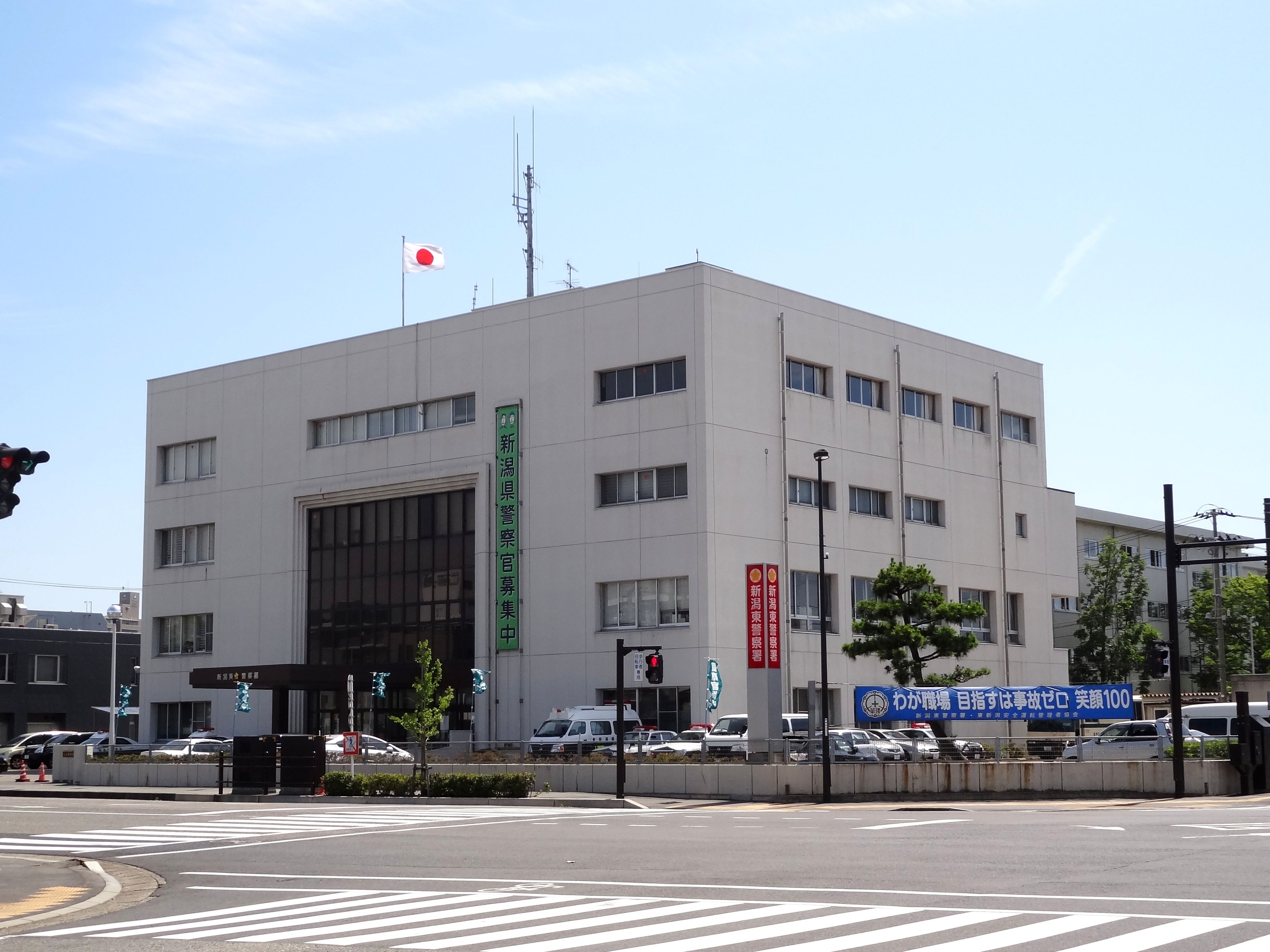 新潟東警察署